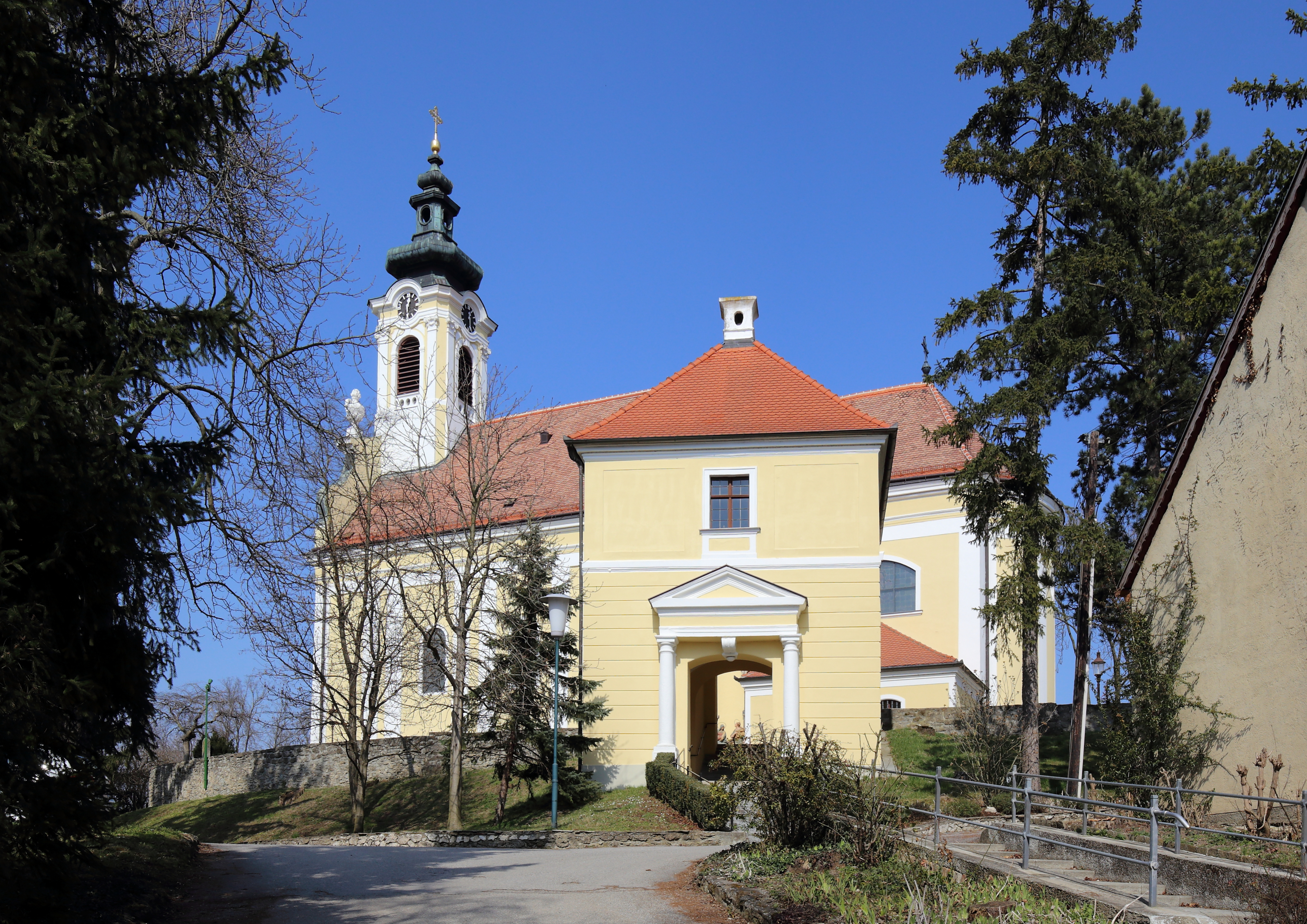 Südansicht der katholischen Pfarrkirche hll. Barbara und Agatha in der niederösterreichischen Marktgemeinde Bad Pirawarth. Ein anstelle einer mittelalterlichen Wehrkirche auf dem Hausberg errichter barocker Sakralbau, der teilweise noch von der ursprünglichen Wehrmauer umgeben ist.